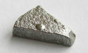 hochreines Eisen 99,97%; Quelle: Foto aus meiner Elementesammlung; Fotograf/Zeichner: Tomihahndorf